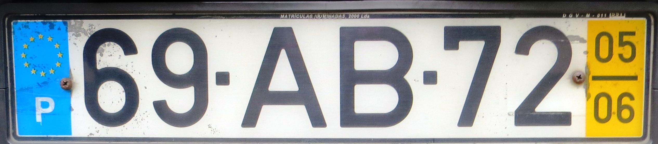 kentekenplaat uit Portugal